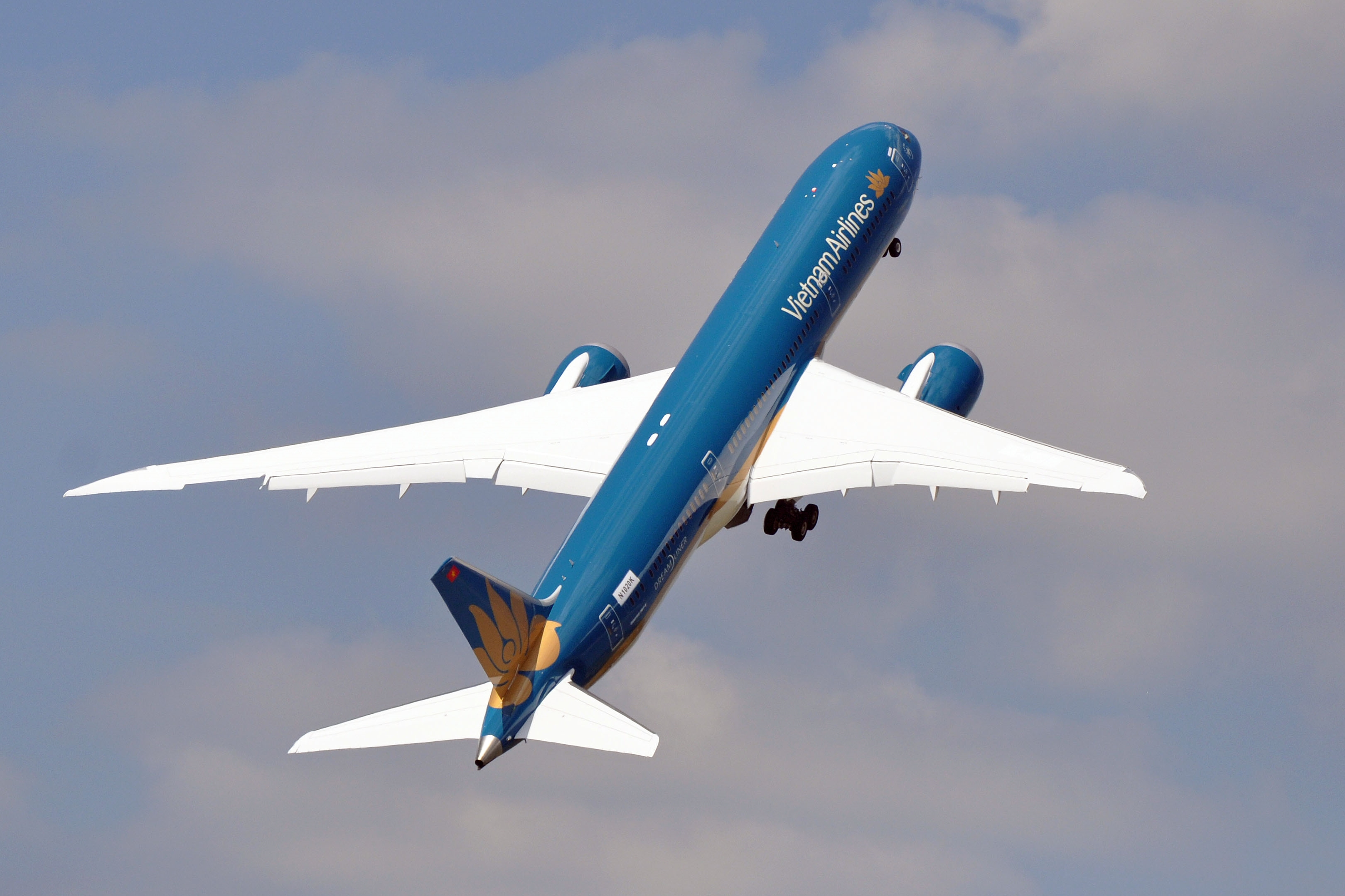 MSN 35151 LN 303 B787-9 VIETNAM AIRLINES LBG INTERNATIONAL AIR SHOW 2015